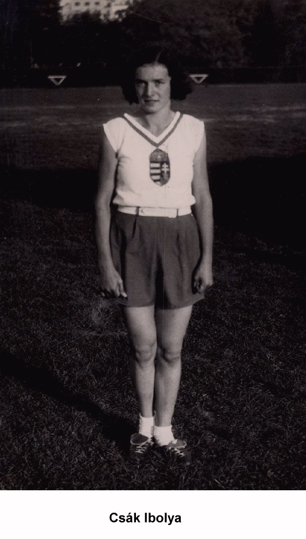 Csák Ibolya az 1936. évi berlini olimpia magyar olimpiai bajnok magasugró atlétája